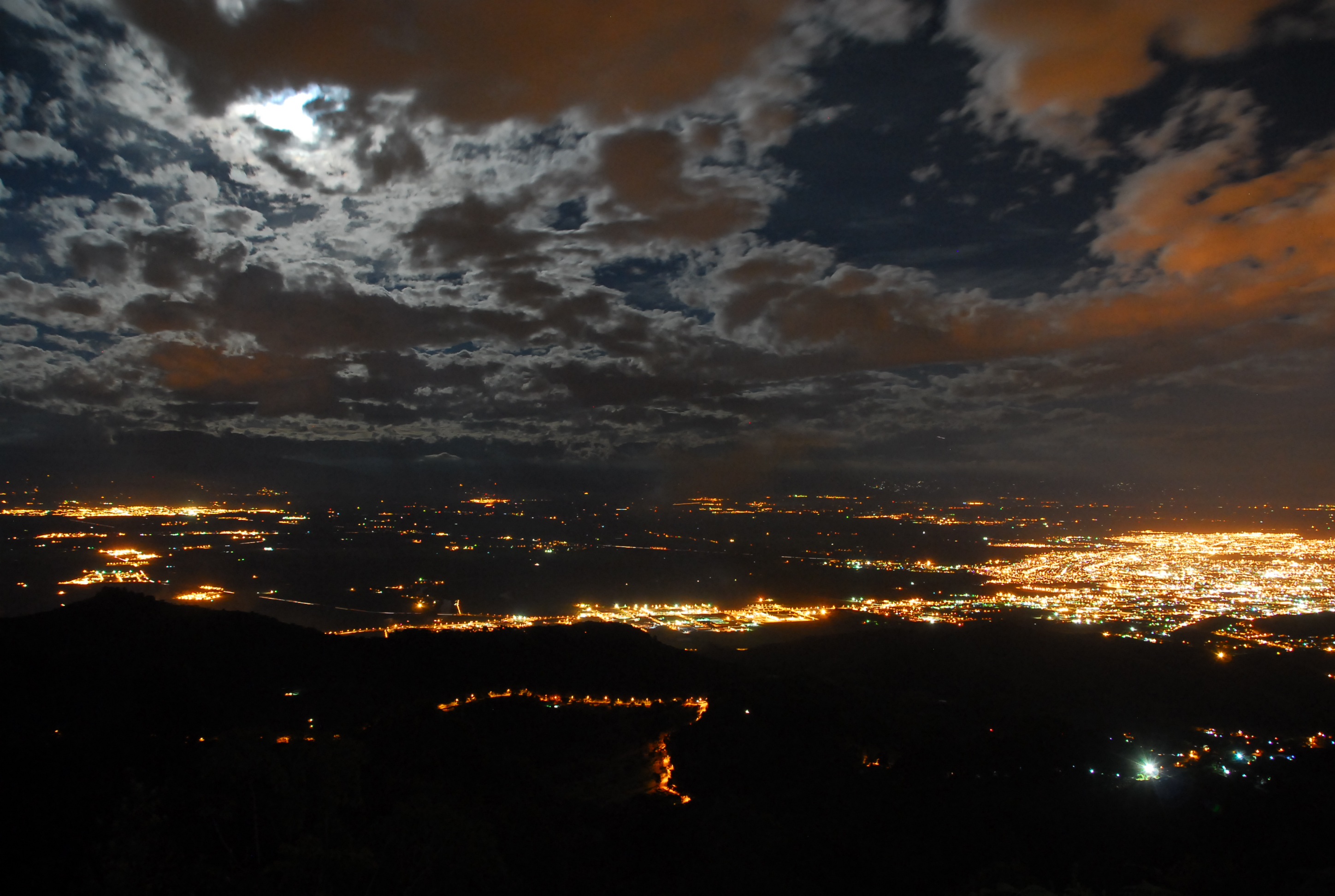 Panorámica de la ciudad de Cali desde Dapa, valle del Cauca